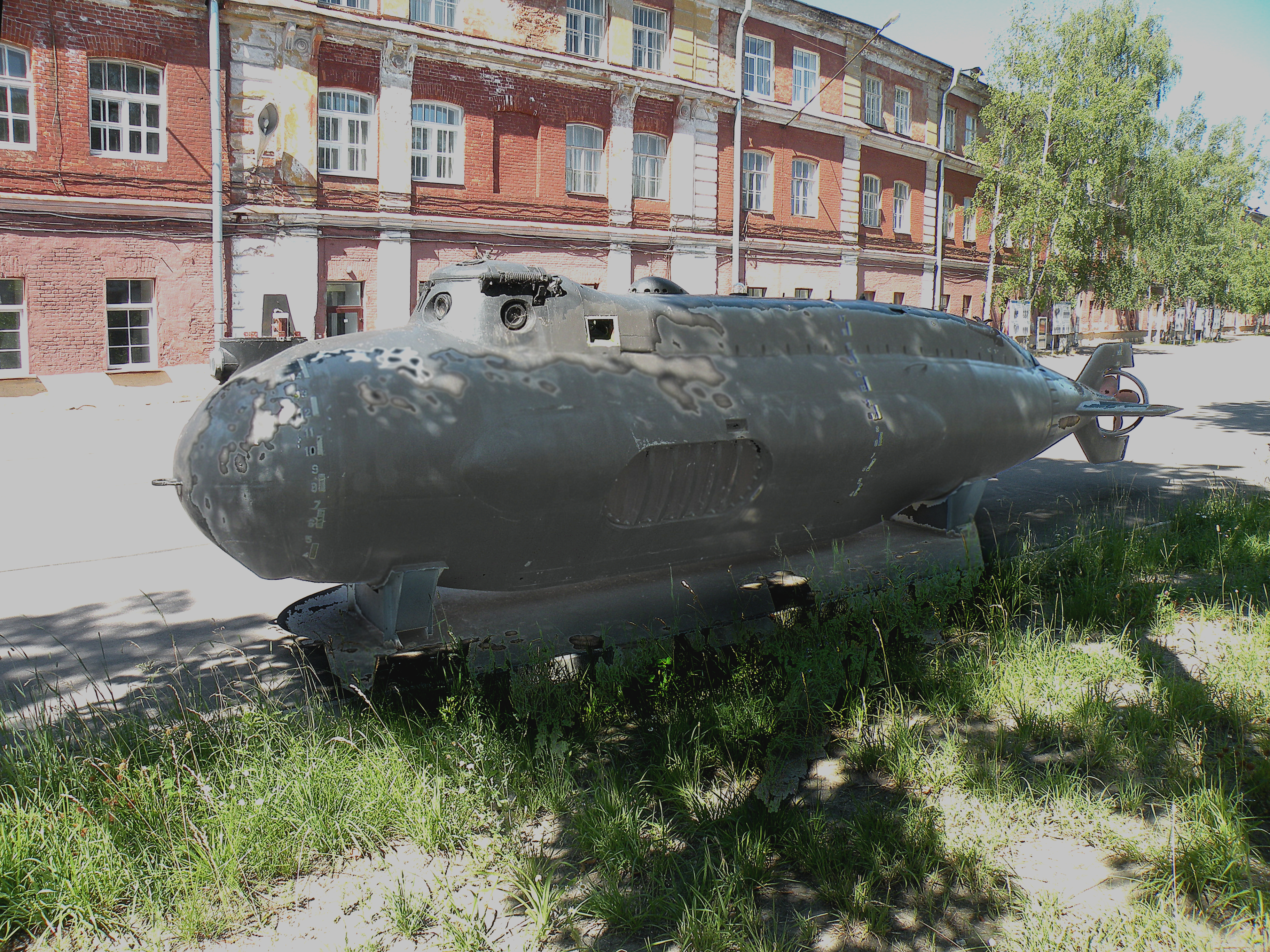 Сверхмалая подводная лодка-носитель легководолазов проекта 908 «Тритон-2» в Кронштатде.